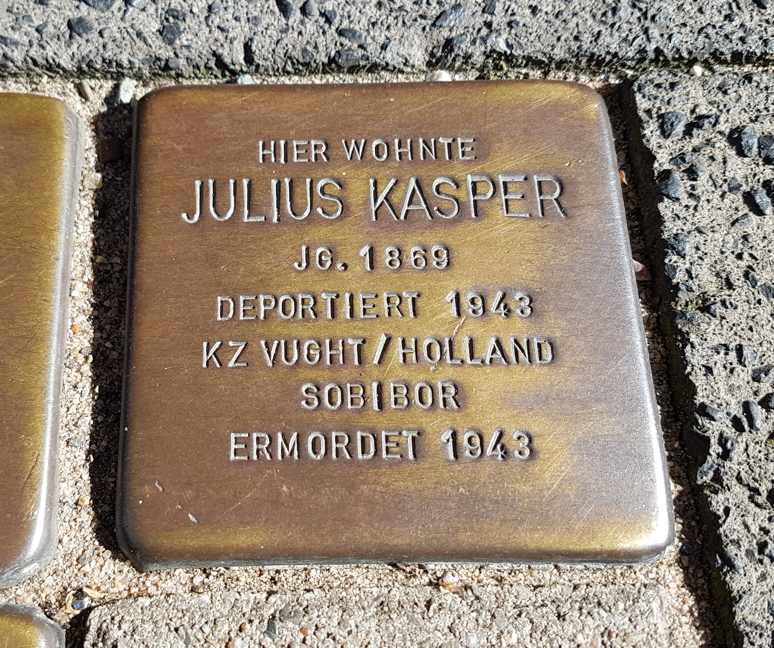 Stolperstein Duisburg Julius Kasper